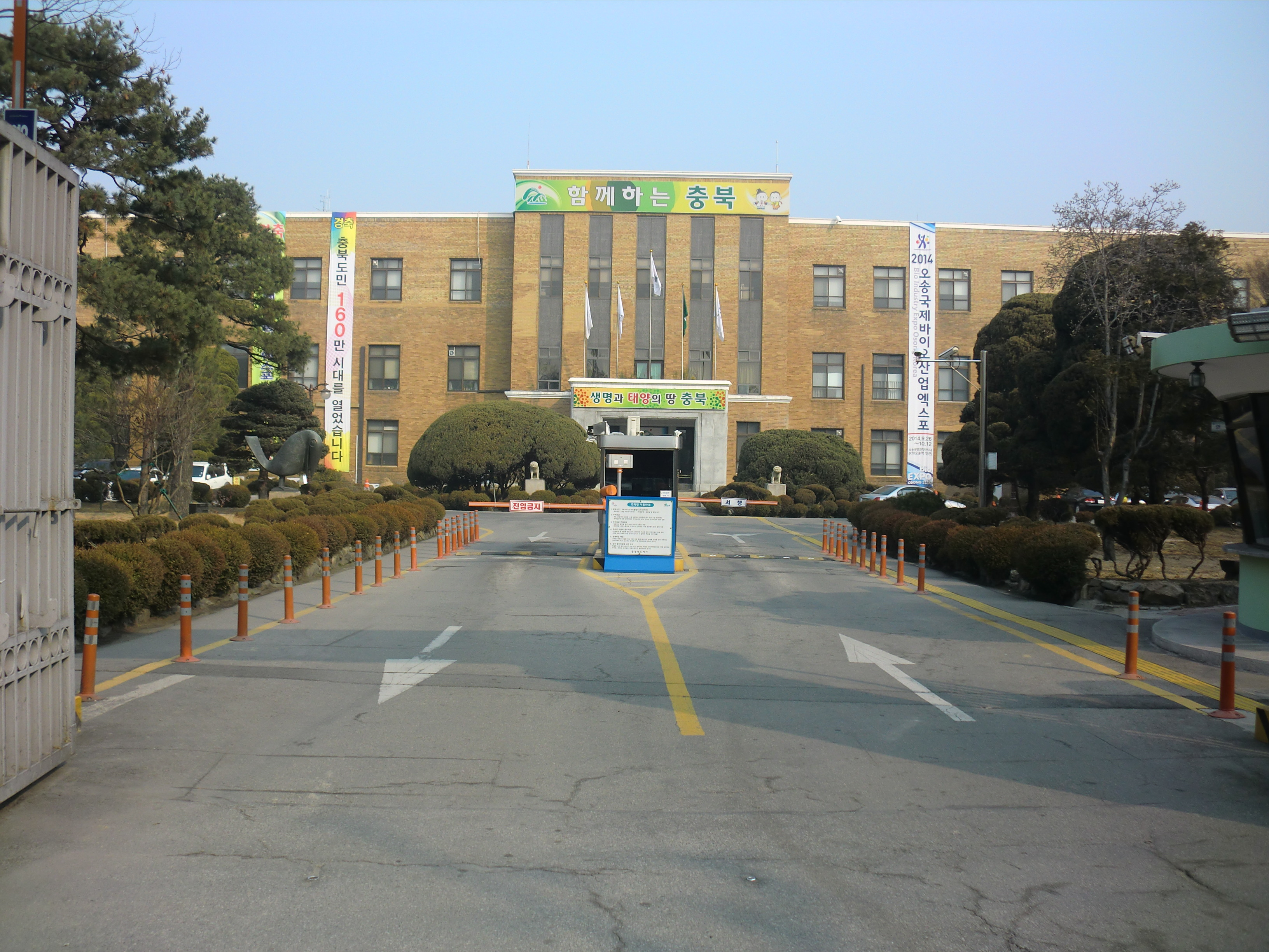 충청북도 청주시에 있는 충청북도청